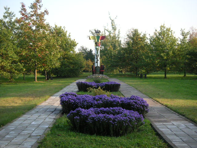 Saugų (Šilutės raj.) medinis paminklas Sibiro kankiniams.